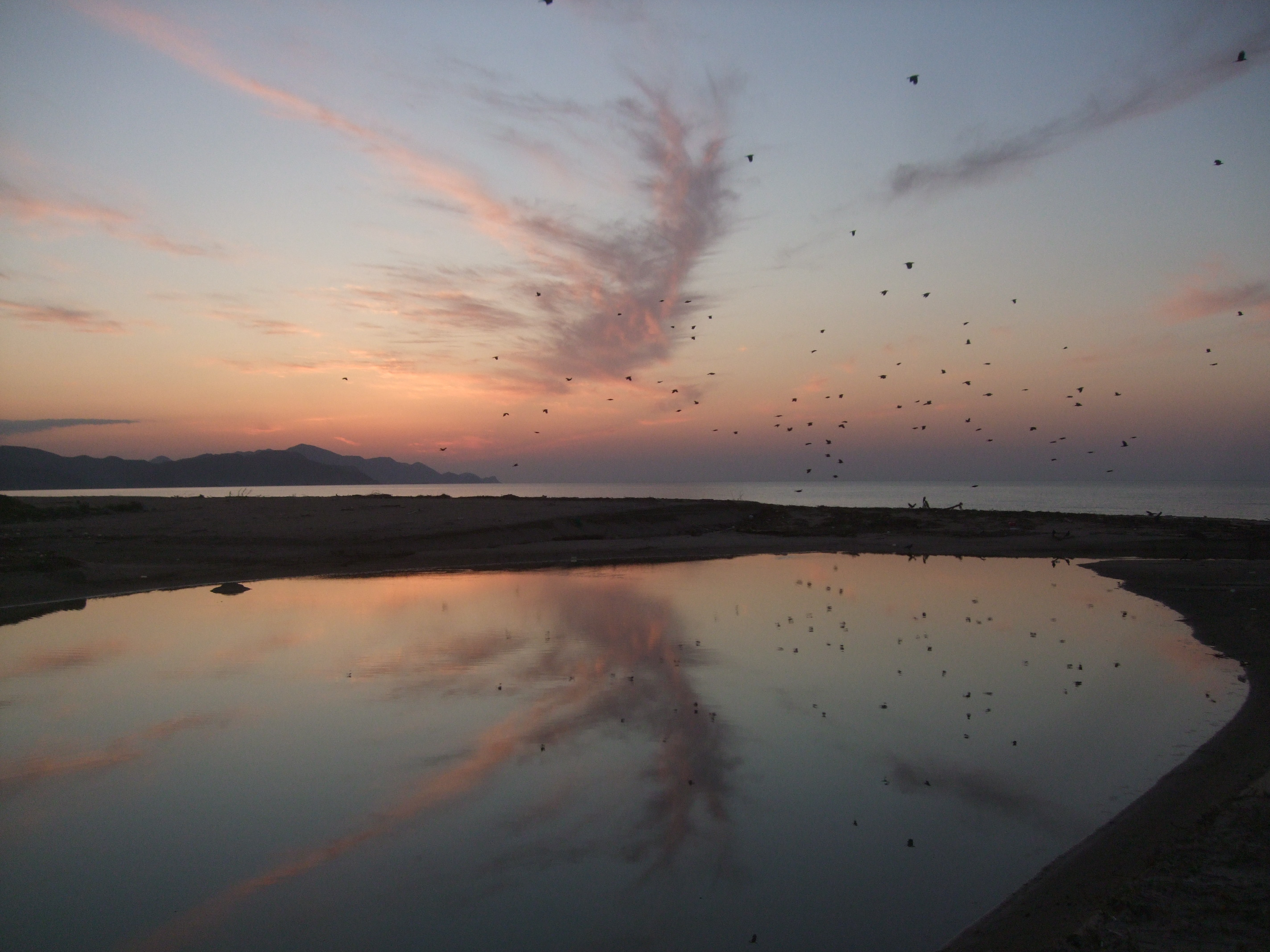 東経１３５°に沈む夕日（夕日ヶ浦海岸）